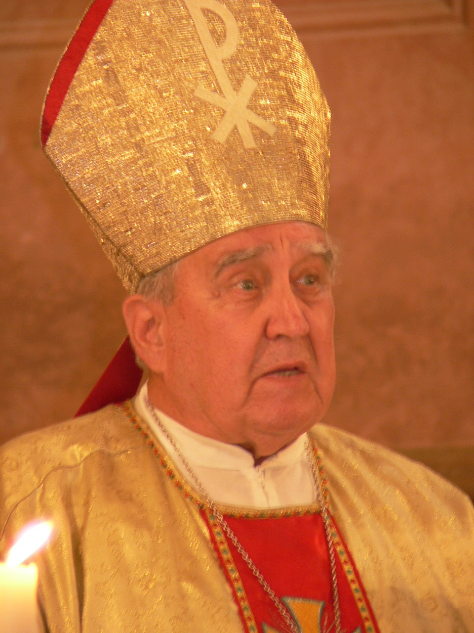 Szendi József püspök 2005-ben